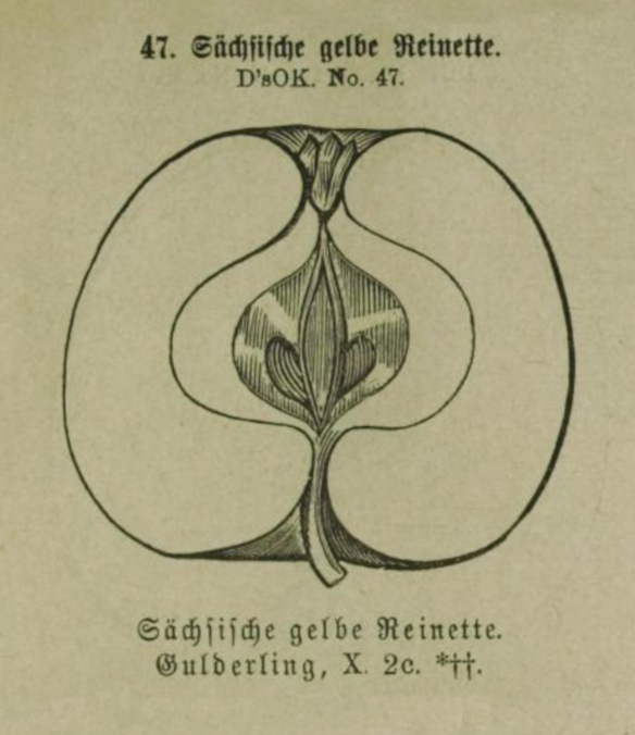 Schnittzeichnung der Sächsischen gelben Reinette aus dem Normal-Obst-Sortiment Sachsen, 1885